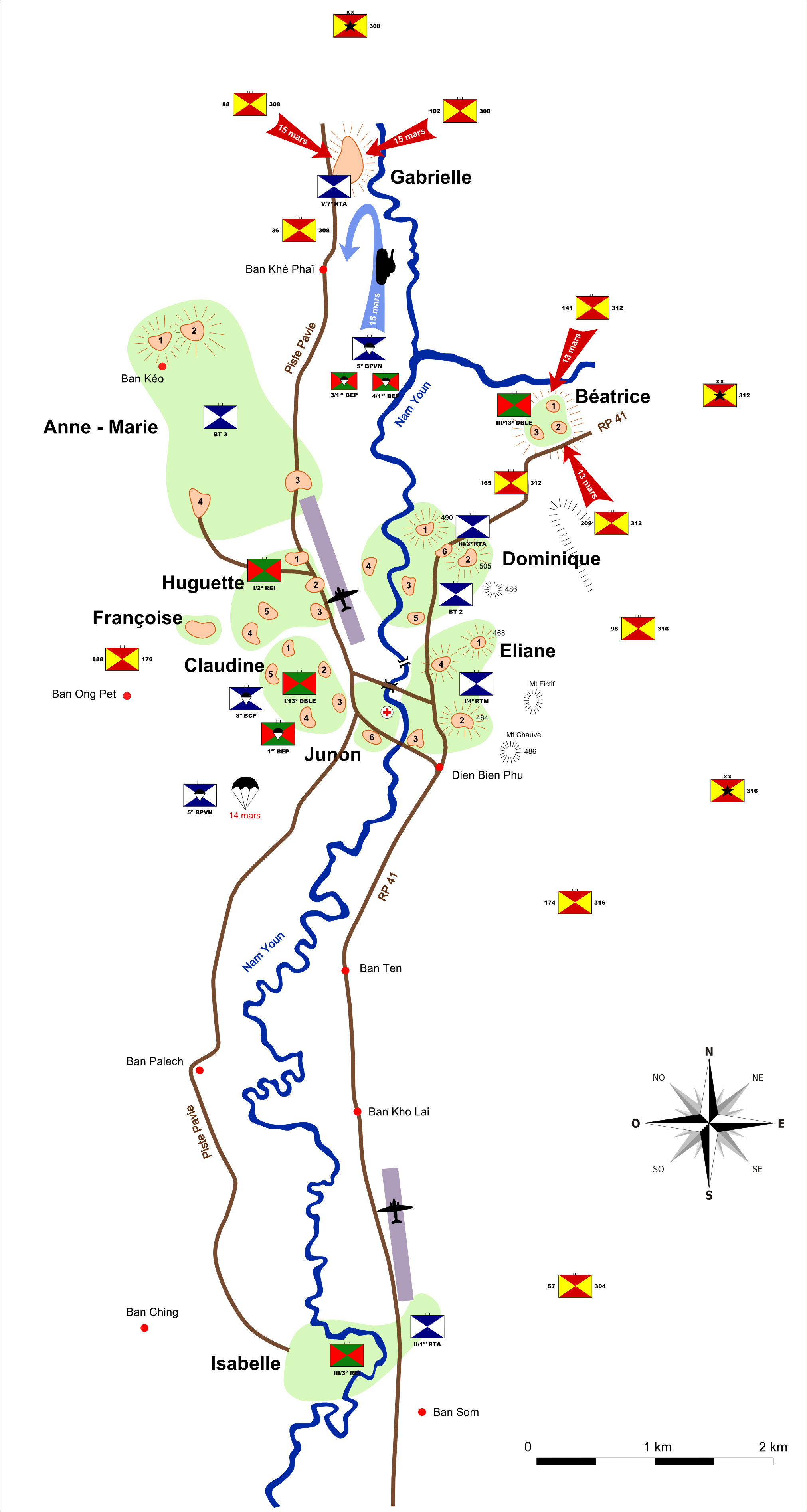 Positions initiales et premiers affrontements Carte issue de 3 livres